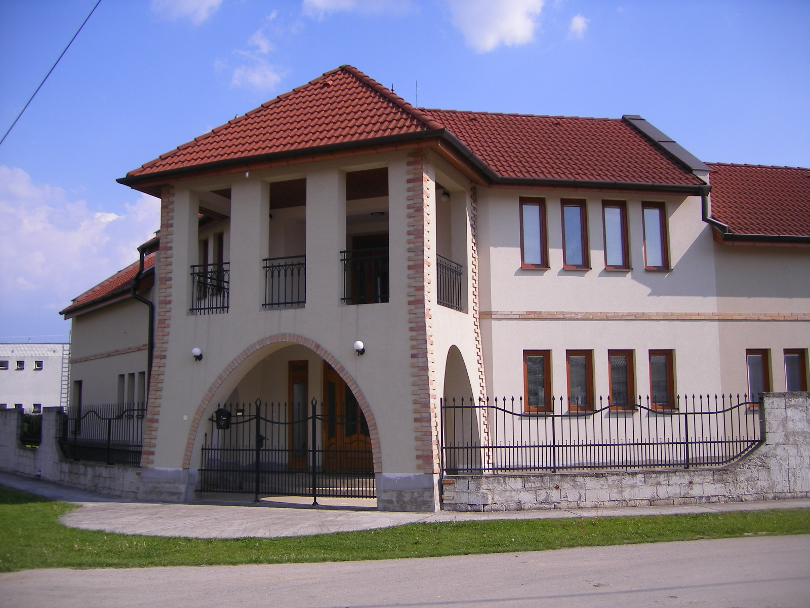 Kamocsa - modern épület a faluközpontban